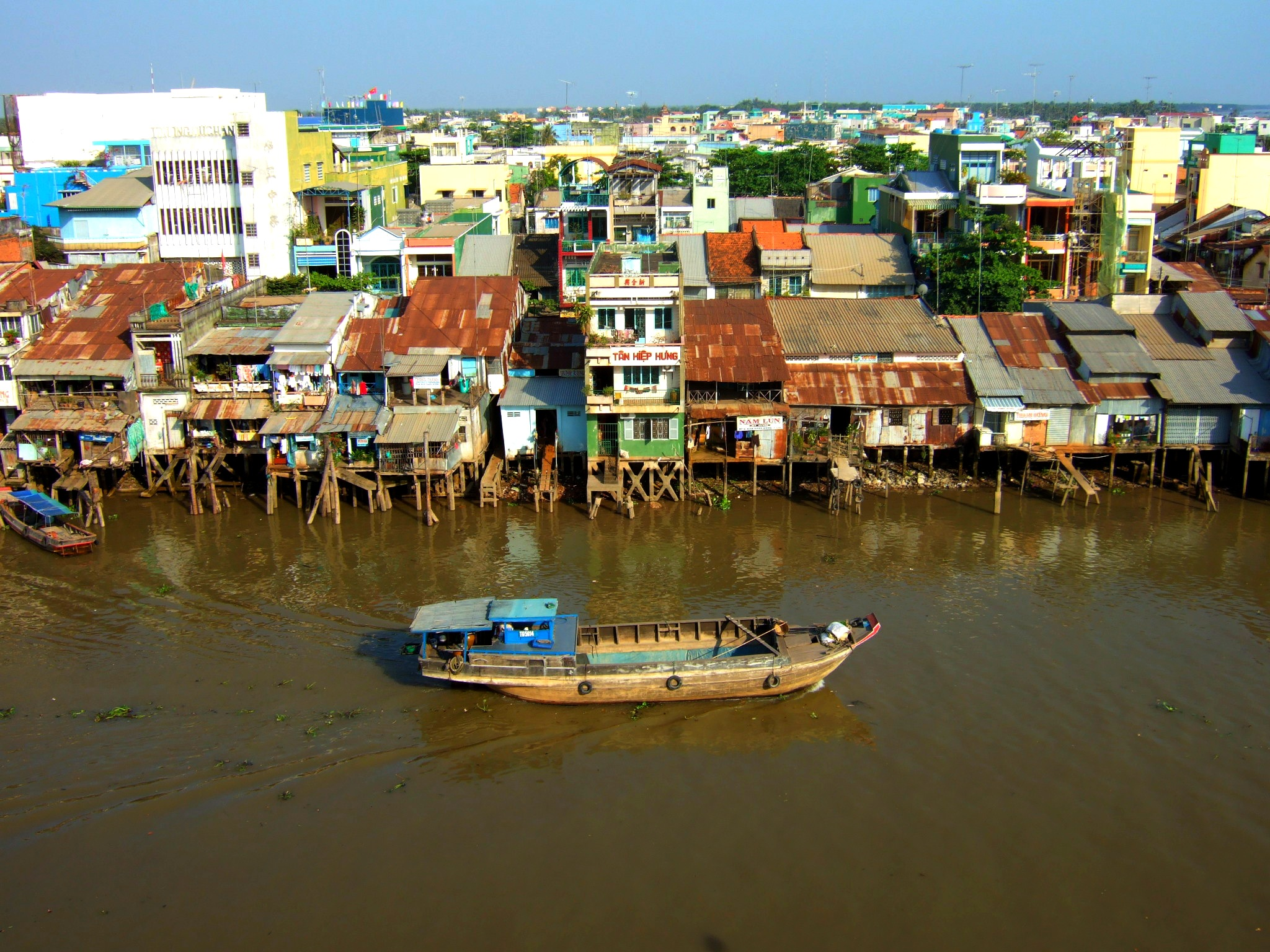 My Tho, Mekong Delta, Vietnam